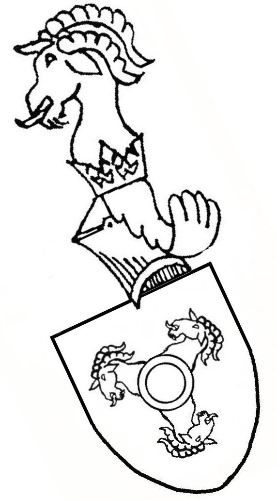 Pokus o rekonstrukci znaku Jana Sokola z Lamberka podle nezřetelného otisku pečeti z roku 1402, zaevidované a popsané Augustem Sedláčkem.